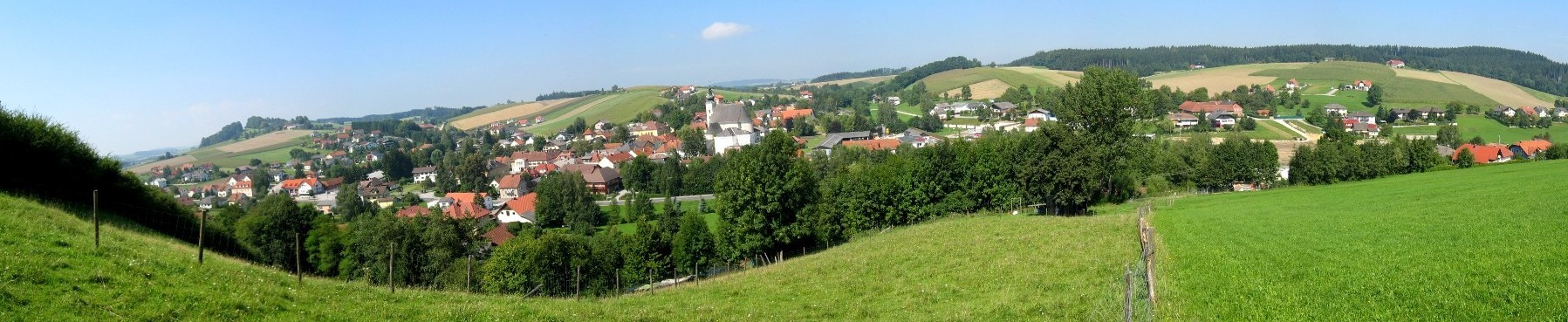 Panoramaansicht der Marktgemeinde Offenhausen